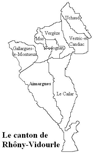 le canton de Rhôny-Vidourle Image personnelle